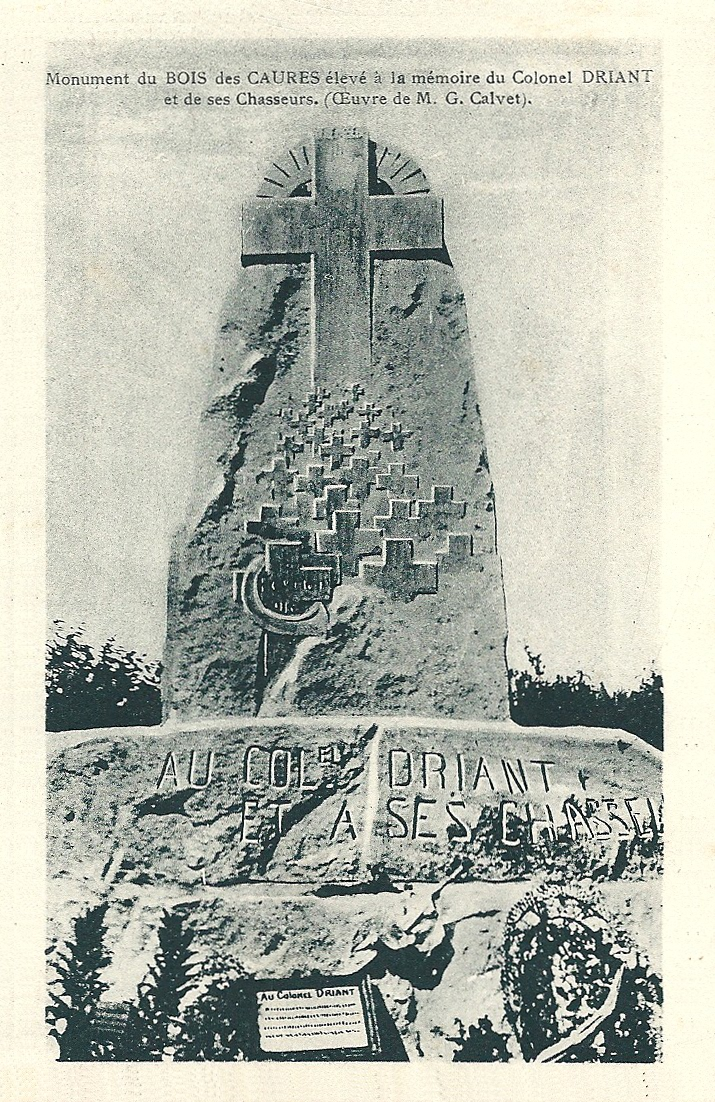 Verdun (Meuse) & environs - Guerre 1914-1918 : Le Bois des Caures : Monument à la mémoire du colonel Driant & des chasseurs qu'il commandait (Oeuvre de M. Grégoire Calvet) - vers 1930